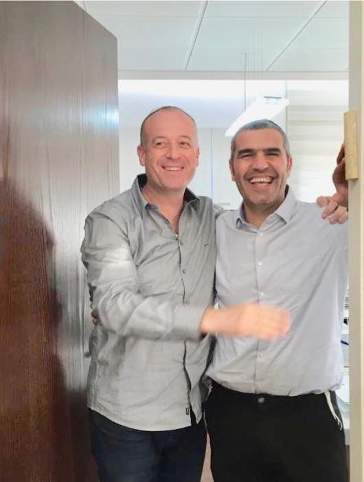 רוצים להמשיך להנהיג את העיר עוד קדנציה